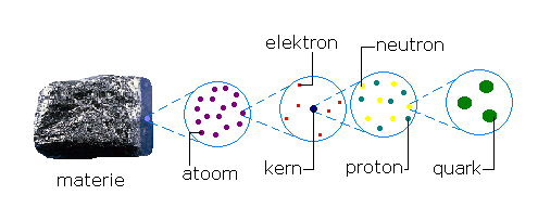 bewerking van "Joël's eigen werk" (om verwarring of discussie te voorkomen) de afbeelding illustreert de samenstelling van grafiet.